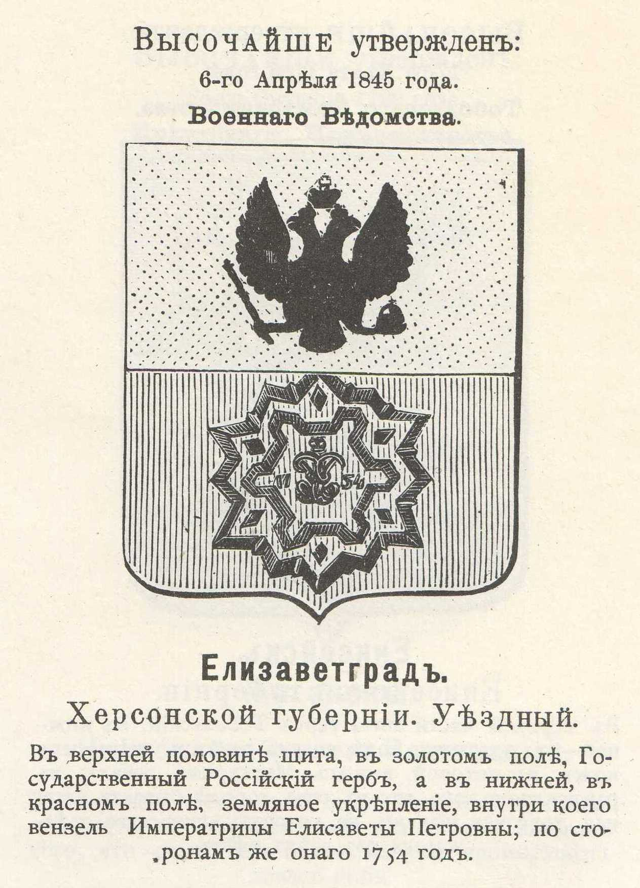 Гласный герб Елизаветграда с официальным описанием в Гербовнике Винклера.